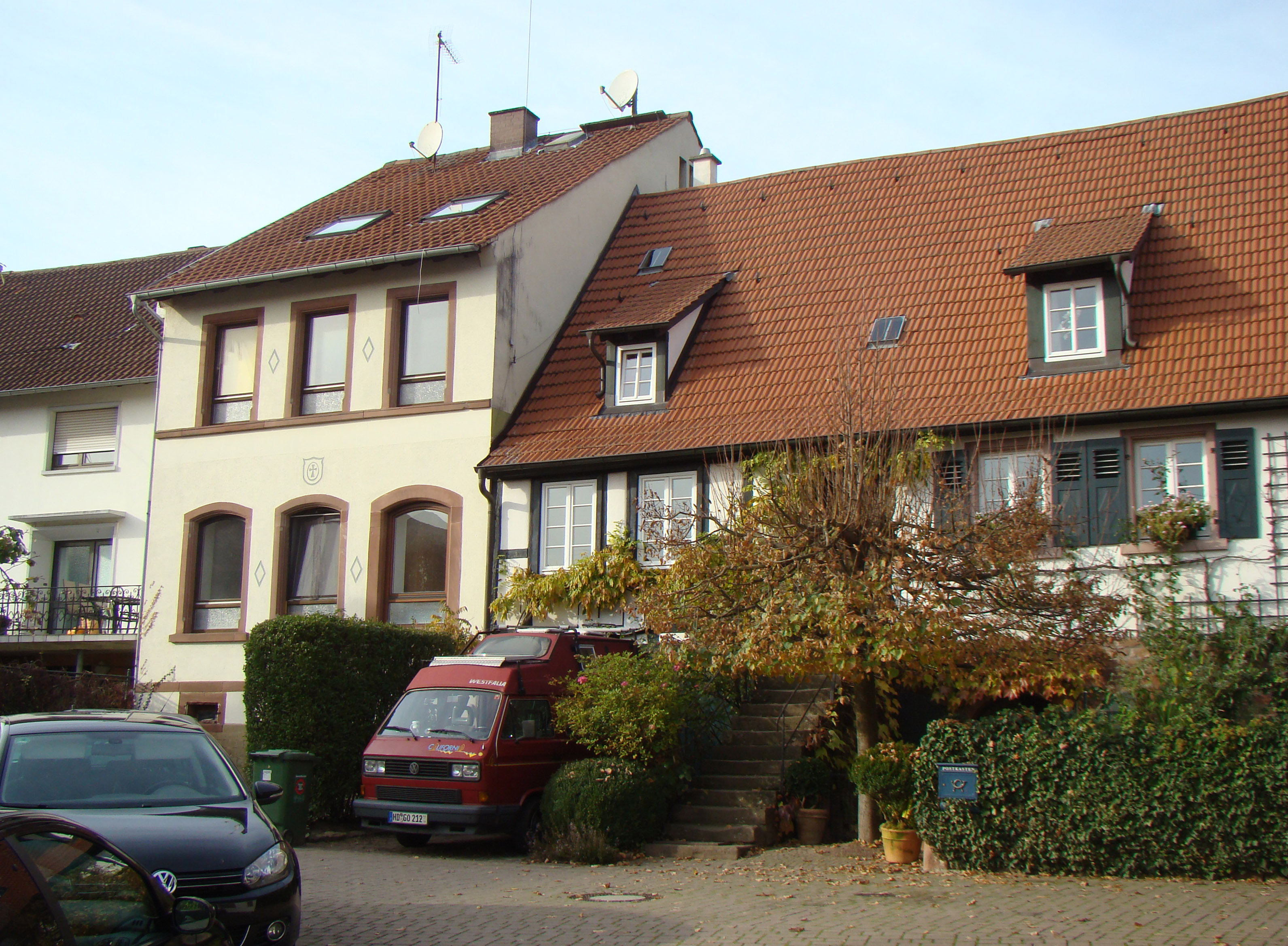 Kloster Lobenfeld, ehem. evang. Schulhaus (linkes Gebäude)